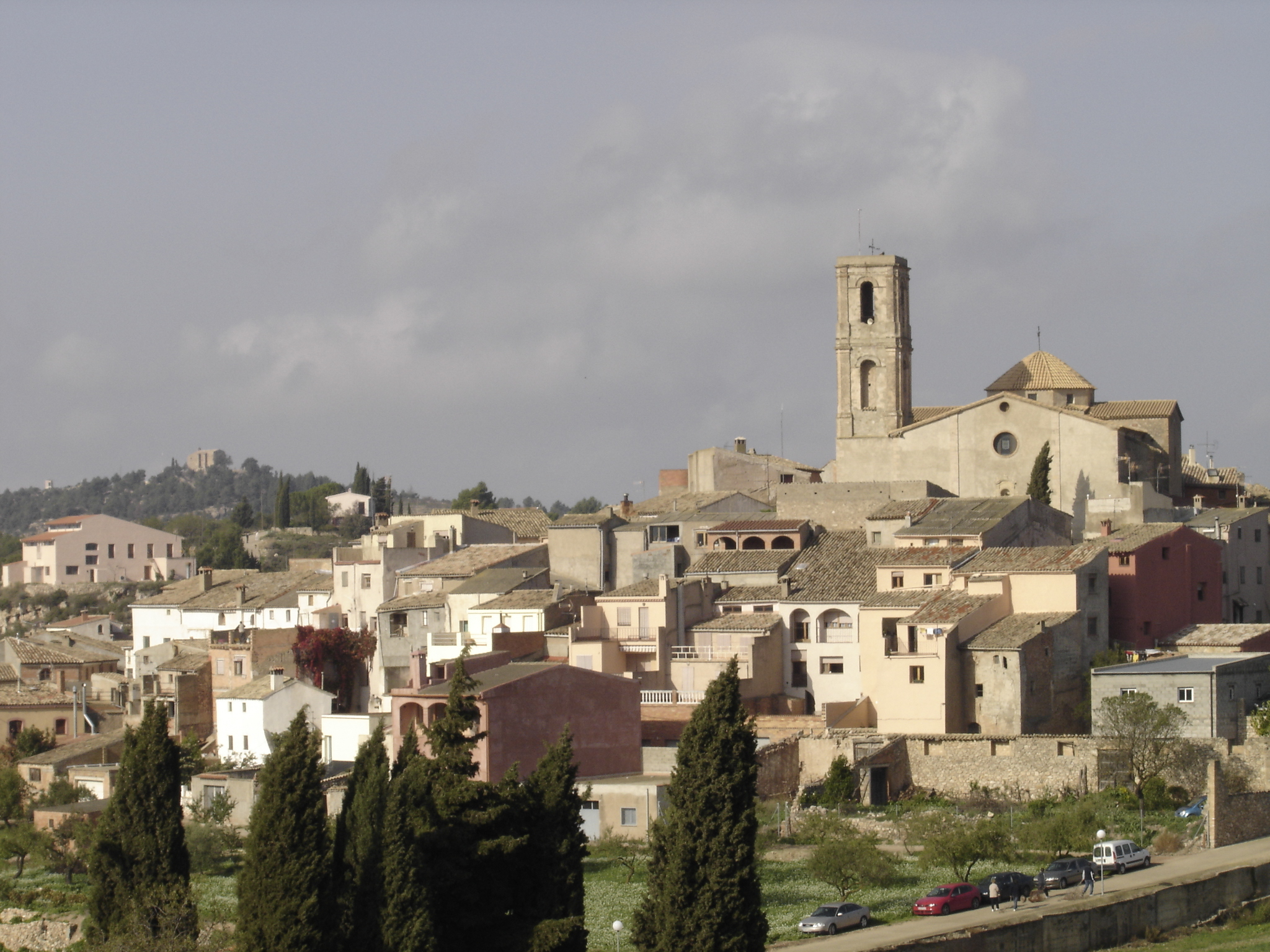 Vista del poble de La Figuera (Priorat - Catalunya)